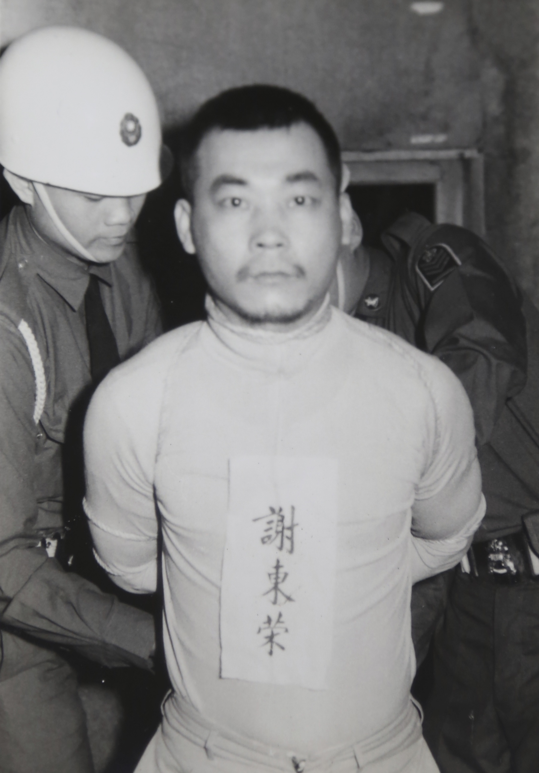 泰源革命謝東榮執行死刑前照片